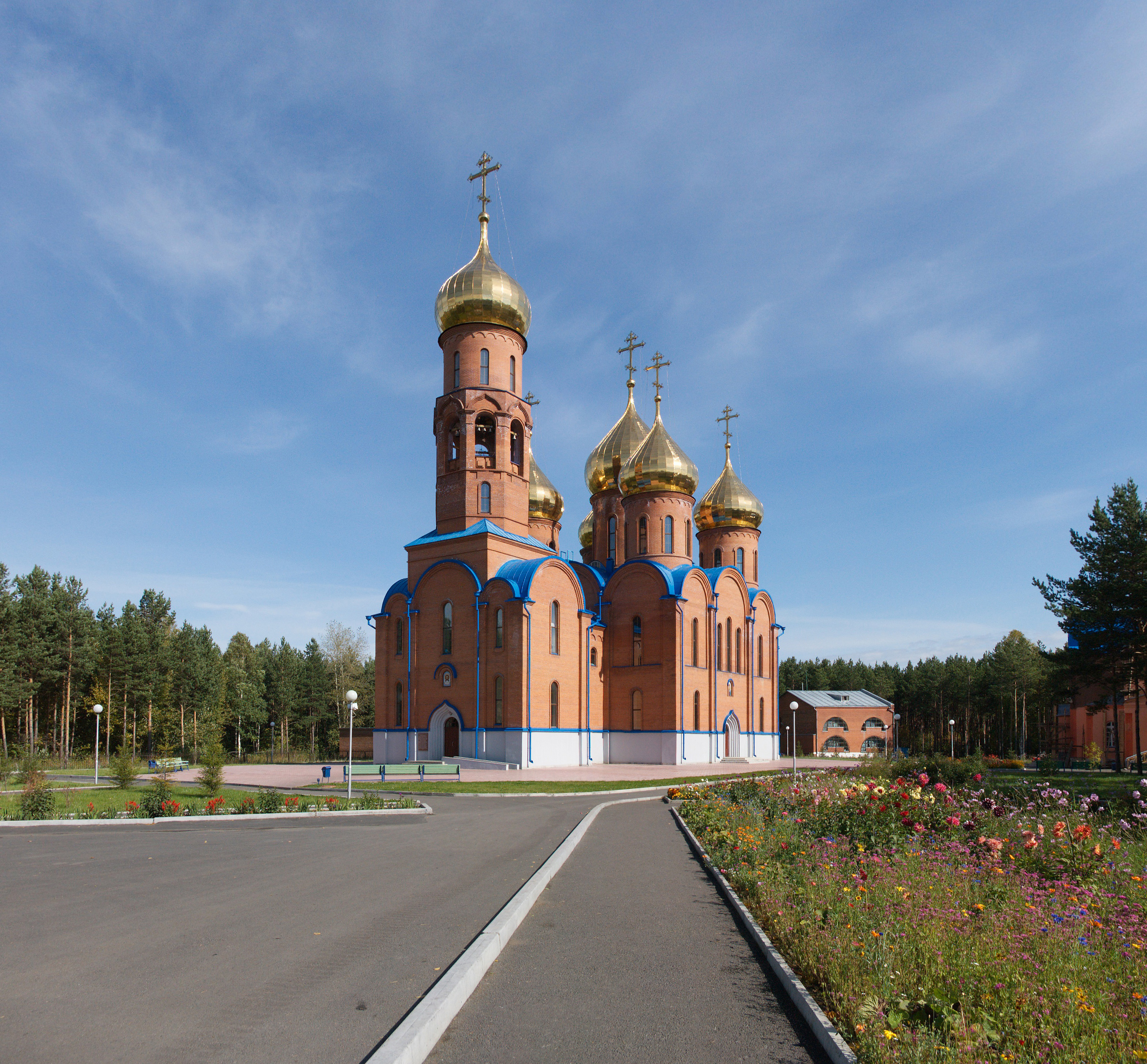 Собор Рождества Иоанна Предтечи, 16 сентября 2006 г., панорама из 2-х кадров